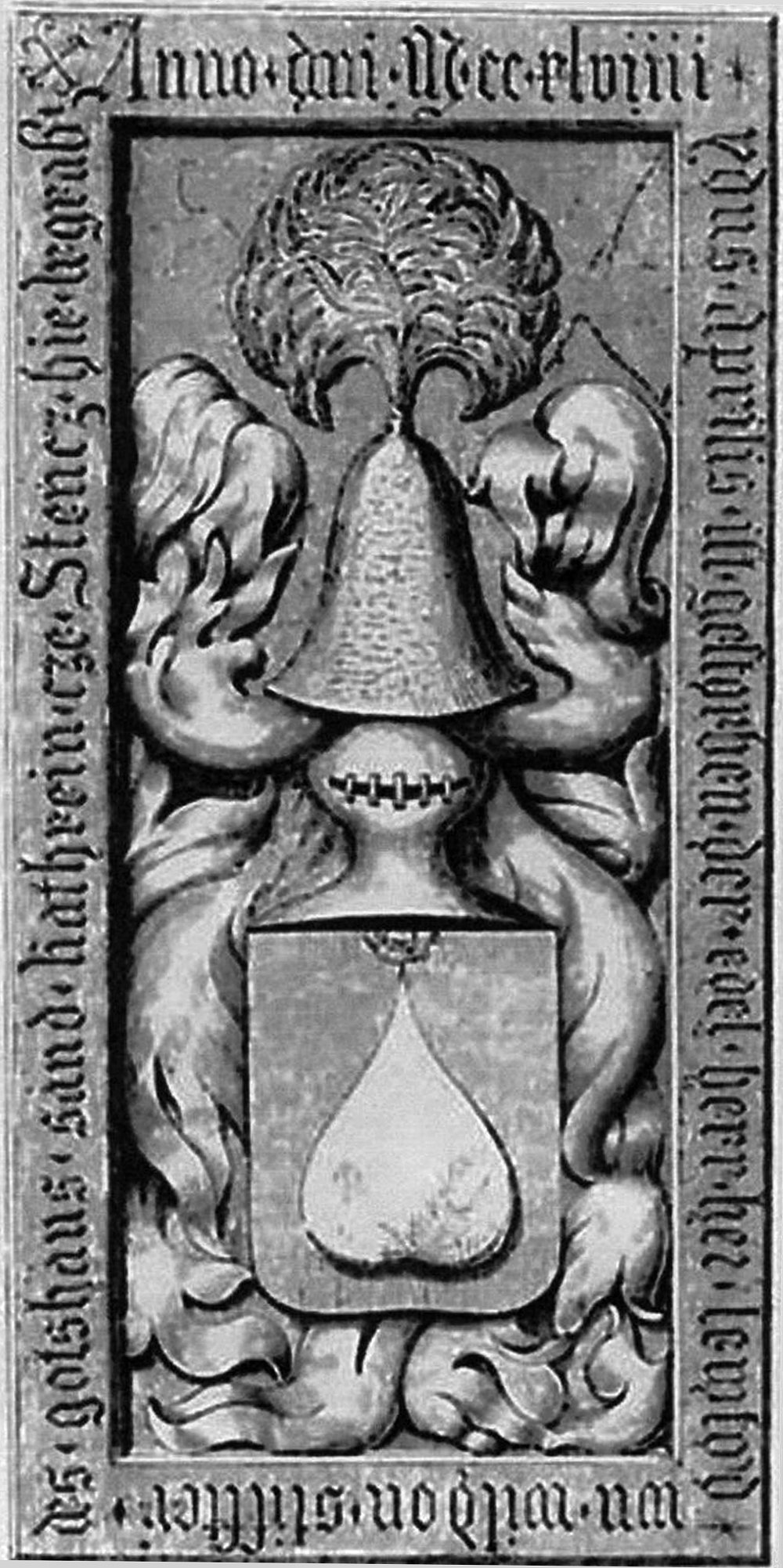 Wappengrabstein des Leutolds von Wildon († 1249). Die Pfarrkirche Hl. Katharina (Stainz), um 1448/1449.